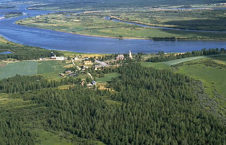 Tornedalen, Hietaniemi kyrka i bildens mitt. Motiv: Hietaniemi Nyckelord: Flygbilder, Riksintressen Kategori: Miljöer, OdlingslandskapTornedalen, Hietaniemi kyrka i bildens mitt.